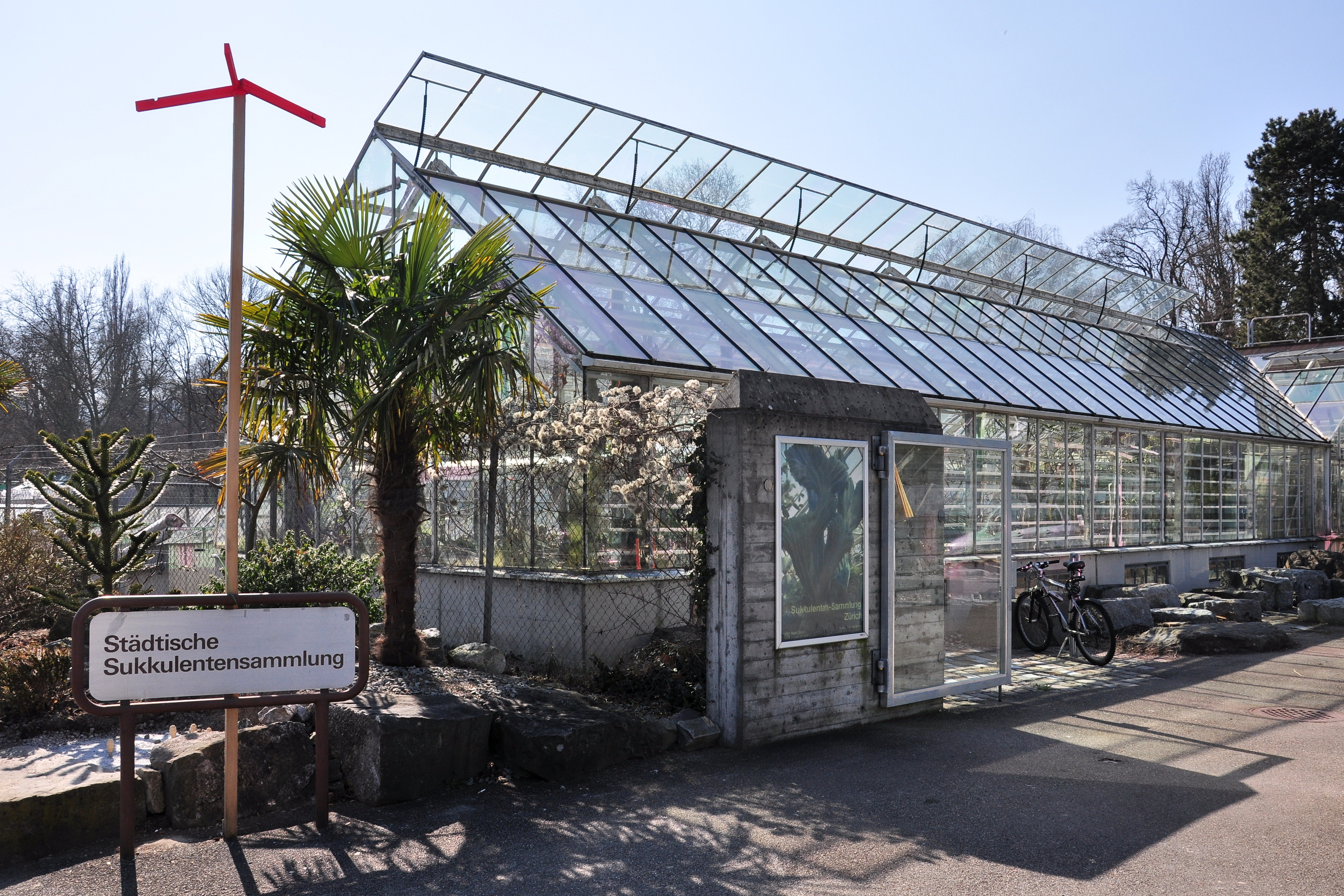 Sukkulentensammlung in Zürich (Switzerland)